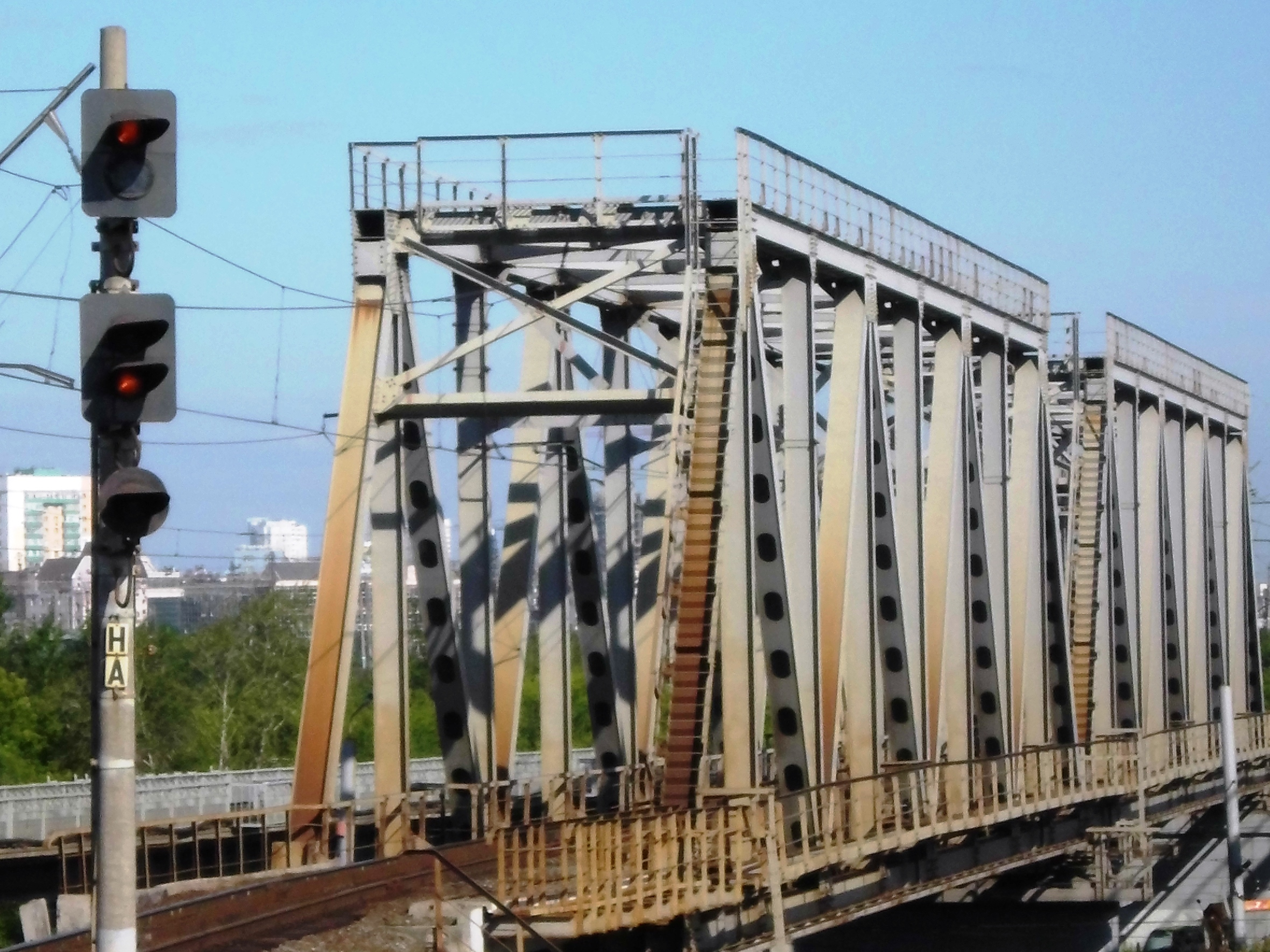 Предупредительный предвходной светофор нечётного направления с пригласительным сигналом перед двухпролётным путепроводом над автомобильной дорогой с трамвайными путями и железнодорожными путями. Включены жёлтый и жёлтый мигающий сигналы. Два двухпролётных путепровода: один с фермой (справа), другой без (слева). Россия.